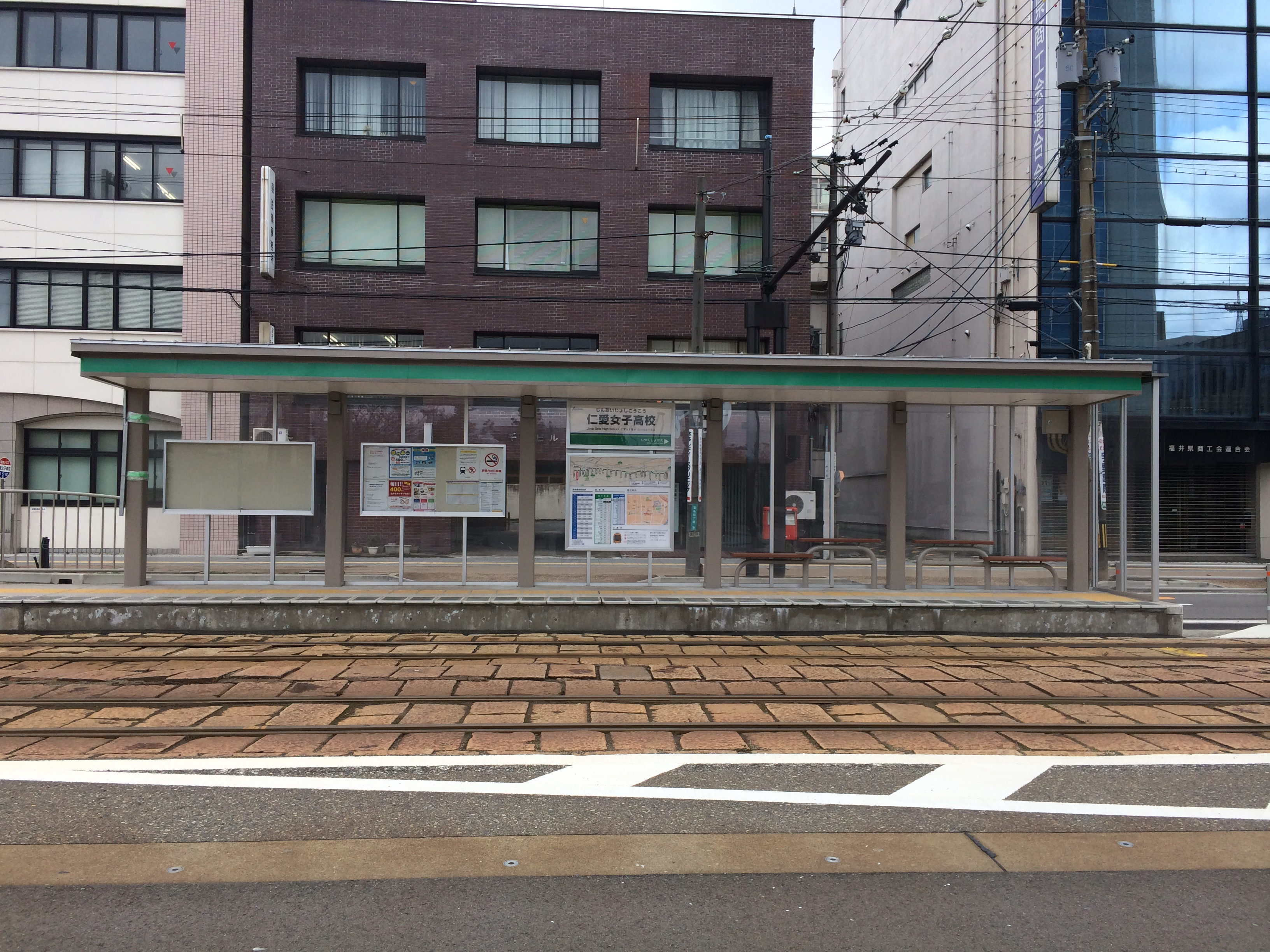 仁愛女子高校電車停留場上りホーム上屋 3月2日投稿者が撮影